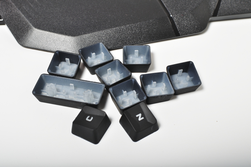 logitech g910 開箱